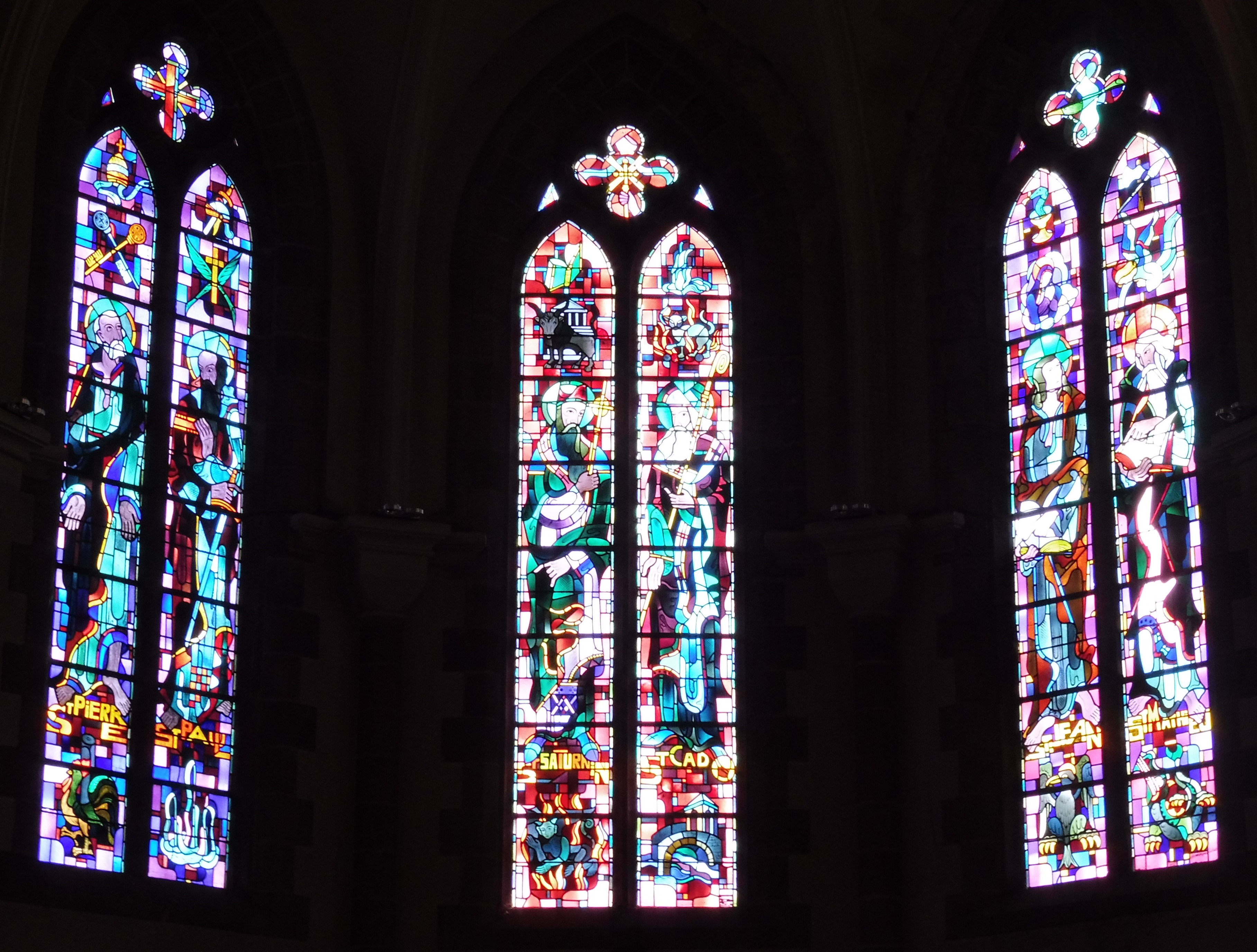 Vitraux représentant Saint Pierre, Saint Paul, Saint Saturnin, Saint Cado, Saint Jean et Saint Mathieu